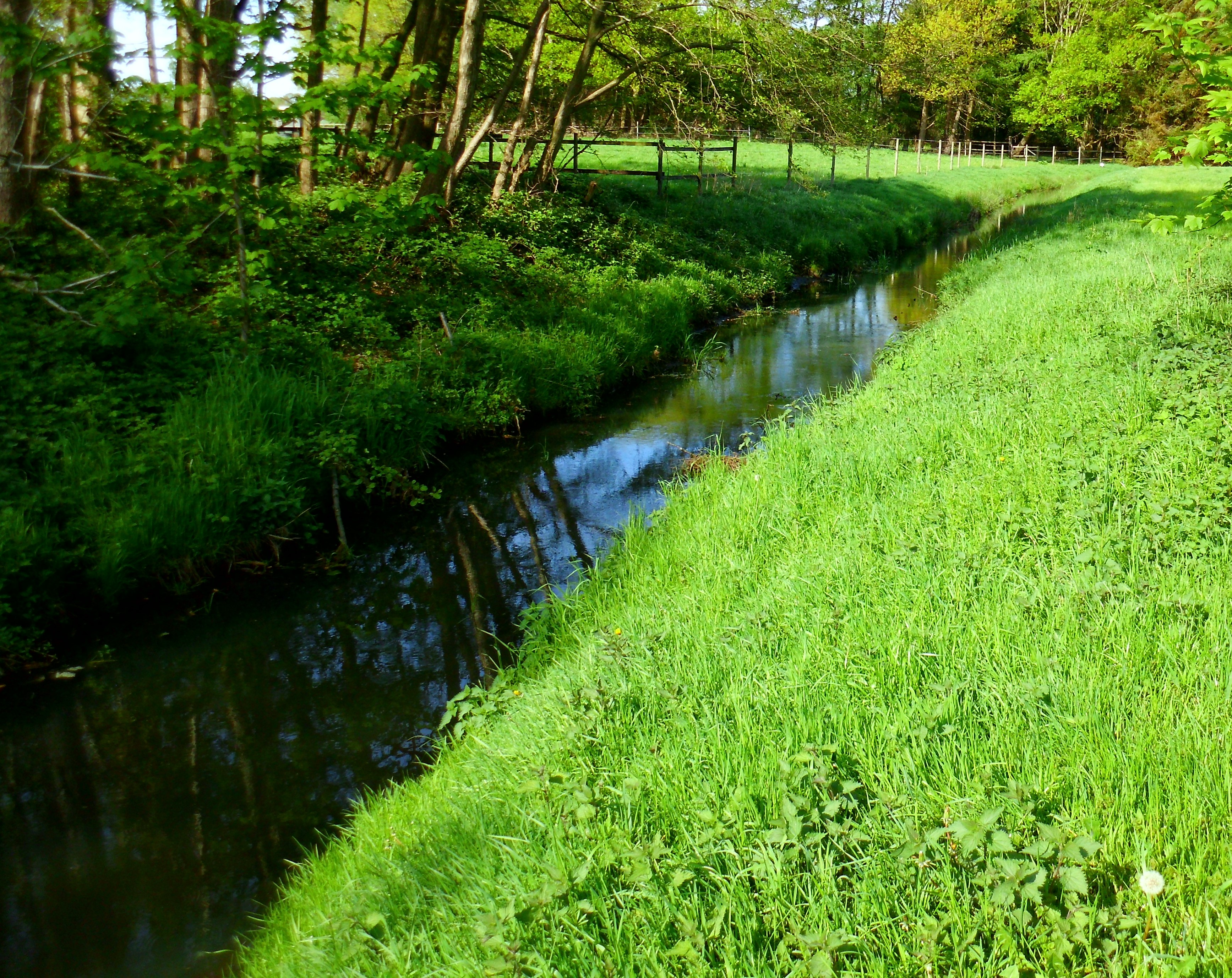 Die Südradde bei Klein-Roscharden in der Gemeinde Lastrup.